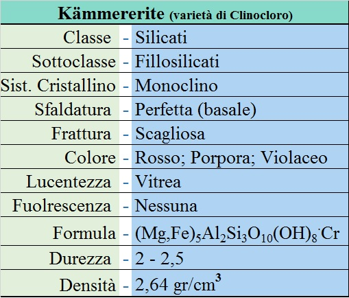 Caratteristiche Chimico-ficiche